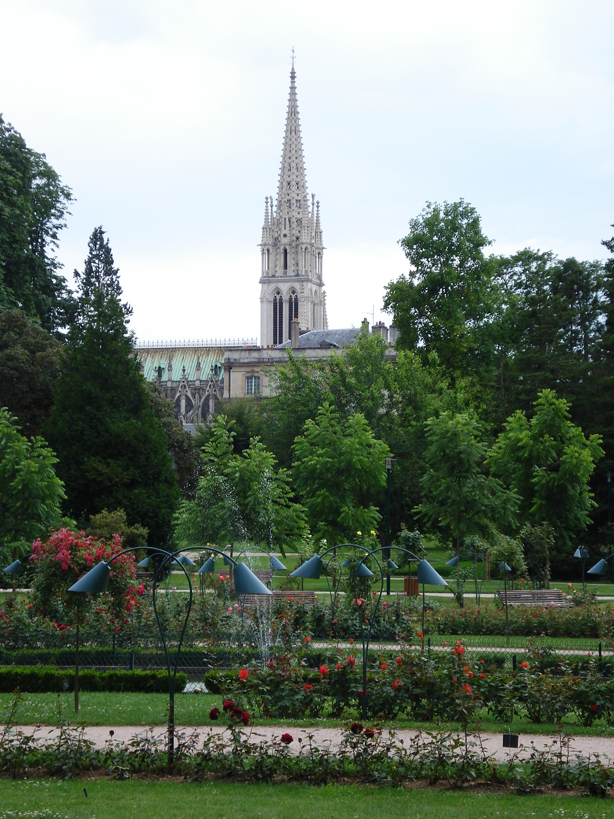 Basilique Saint Epvre vue depuis le parc de la Pépinière Nancy. La Basilique Saint-Epvre de Nancy est une basilique de style néogothique construite au XIXe siècle en pierre d'Euville, située place Saint-Epvre dans la Vieille-Ville. La basilique est dédiée à Saint Epvre, évêque de Toul.